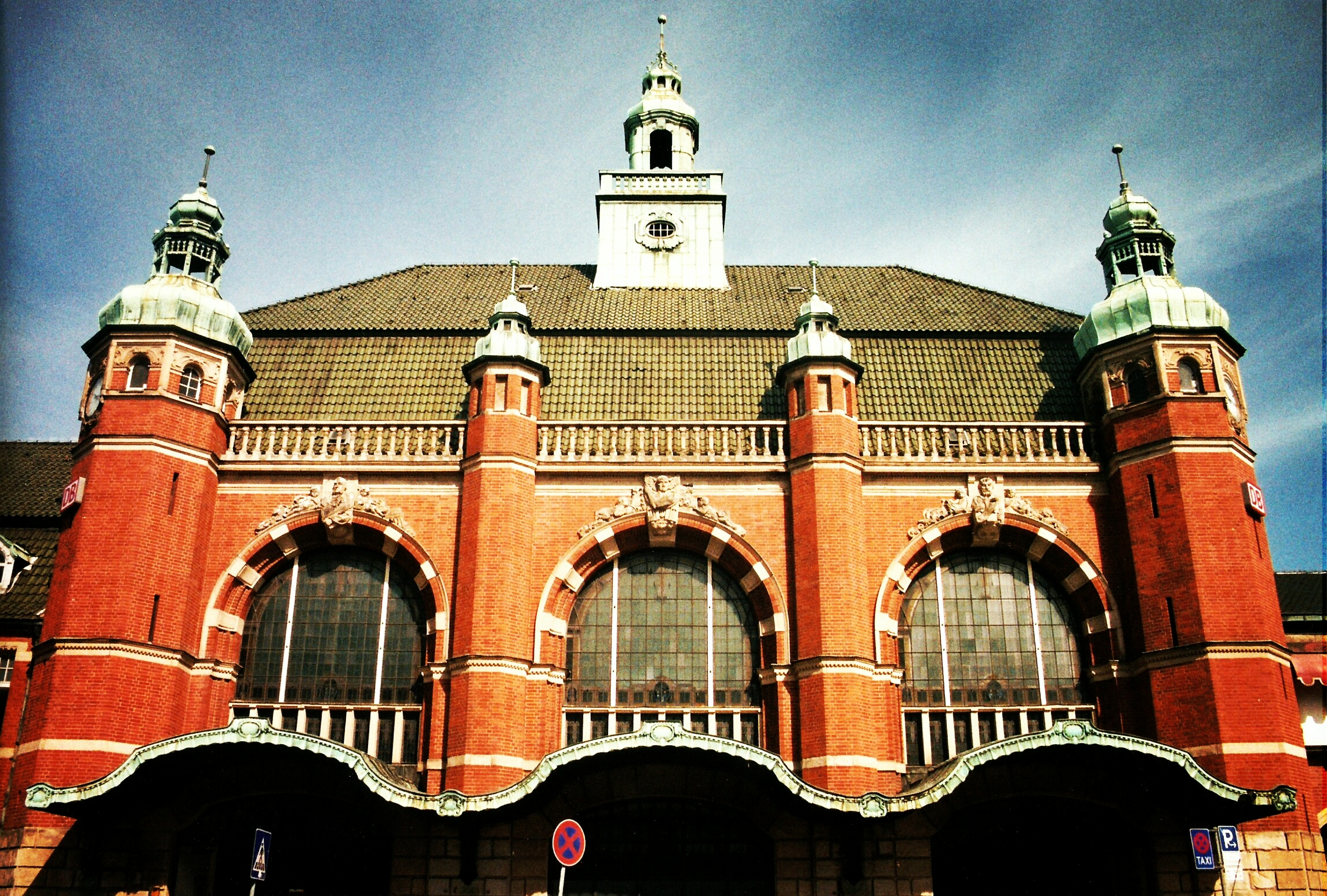 Lübecker Hauptbahnhof von der gegenüberliegenden Straßenseite